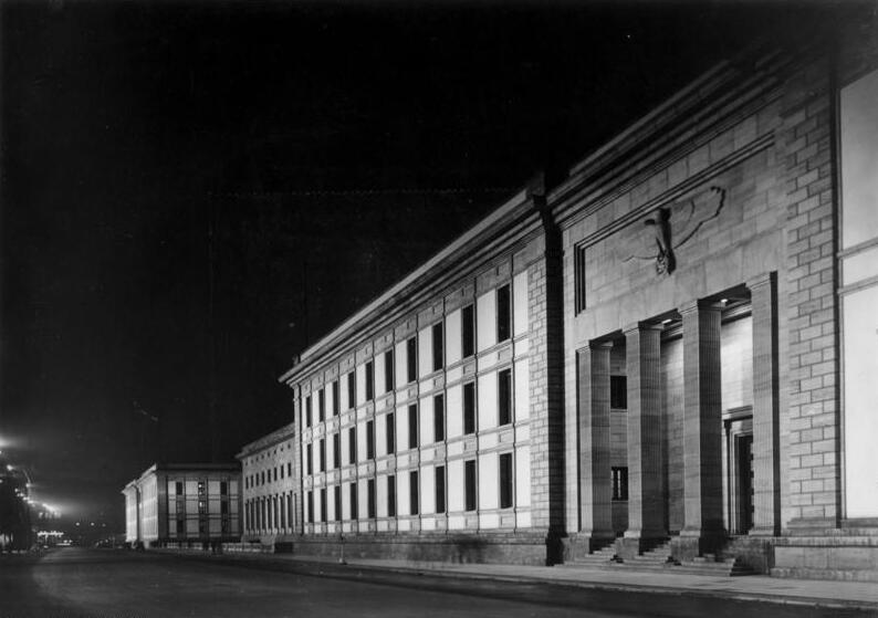 Berlin, Neue Reichskanzlei Scherl Bilderdienst: Nachtaufnahme der Reichskanzlei, April 1939